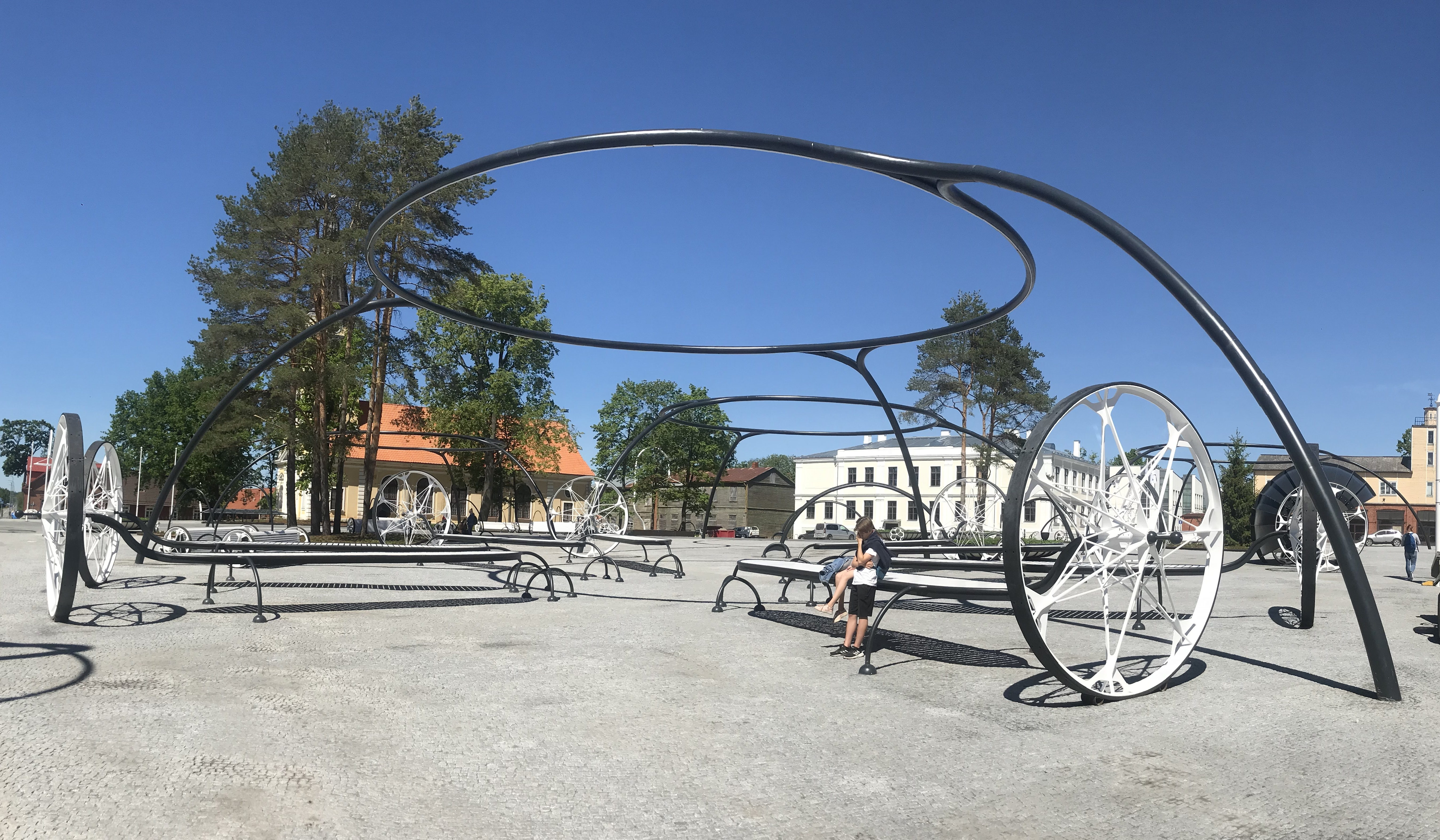 Võru keskväljak